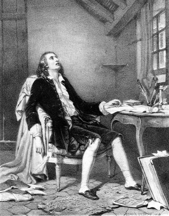 French poet Jacques-Charles-Louis Clinchamps de Malfilâtre (1733-1767) after Firmin Perlin (1747-1783)